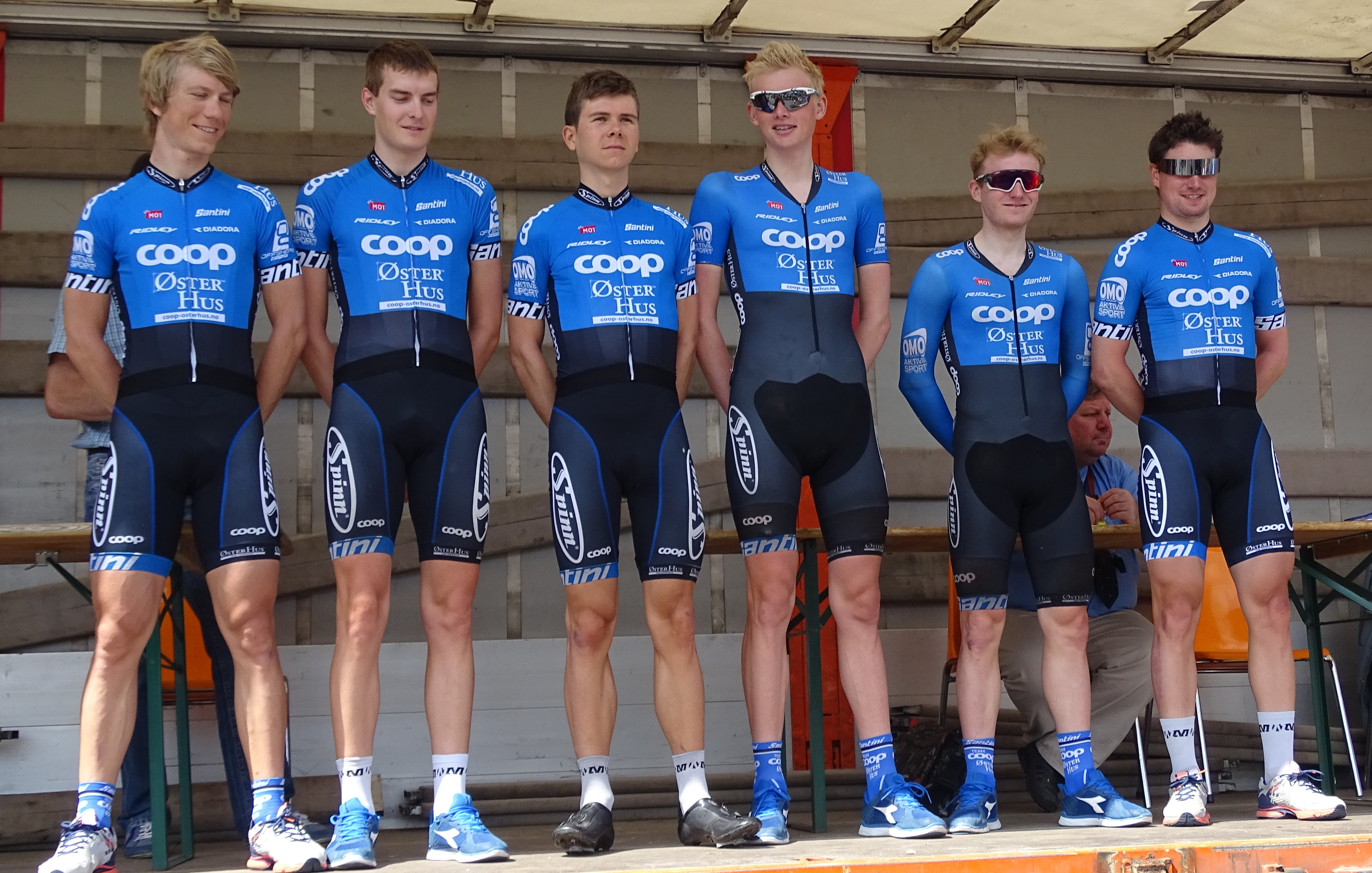 Reportage réalisé le dimanche 7 juin à l'occasion du départ du Mémorial Philippe Van Coningsloo 2015 à Wavre, Belgique.